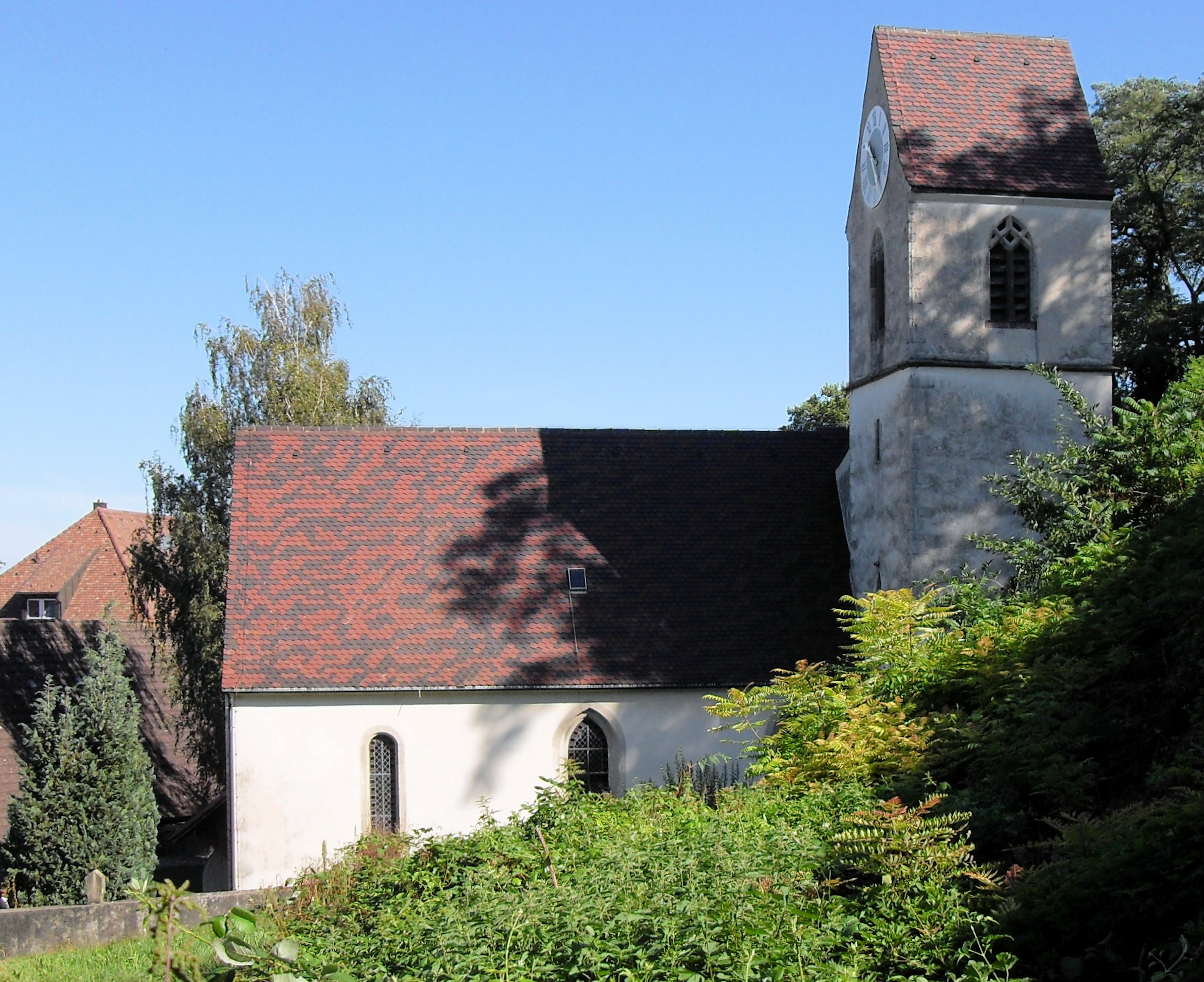 Kirche St. Sebastian in Schlatt, Baden-Württemberg, Deutschland